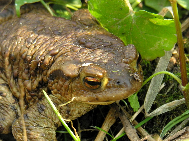 Pilkoji rupūžė (Bufo bufo) Šeima. Rupūžės (Bufonidae) Fotografavo: Algirdas, 2006 m. balandžio 28 d., Lietuva.